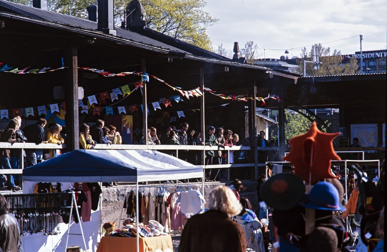 Maailma kylässä -festivaalit. VR:n makasiinit.